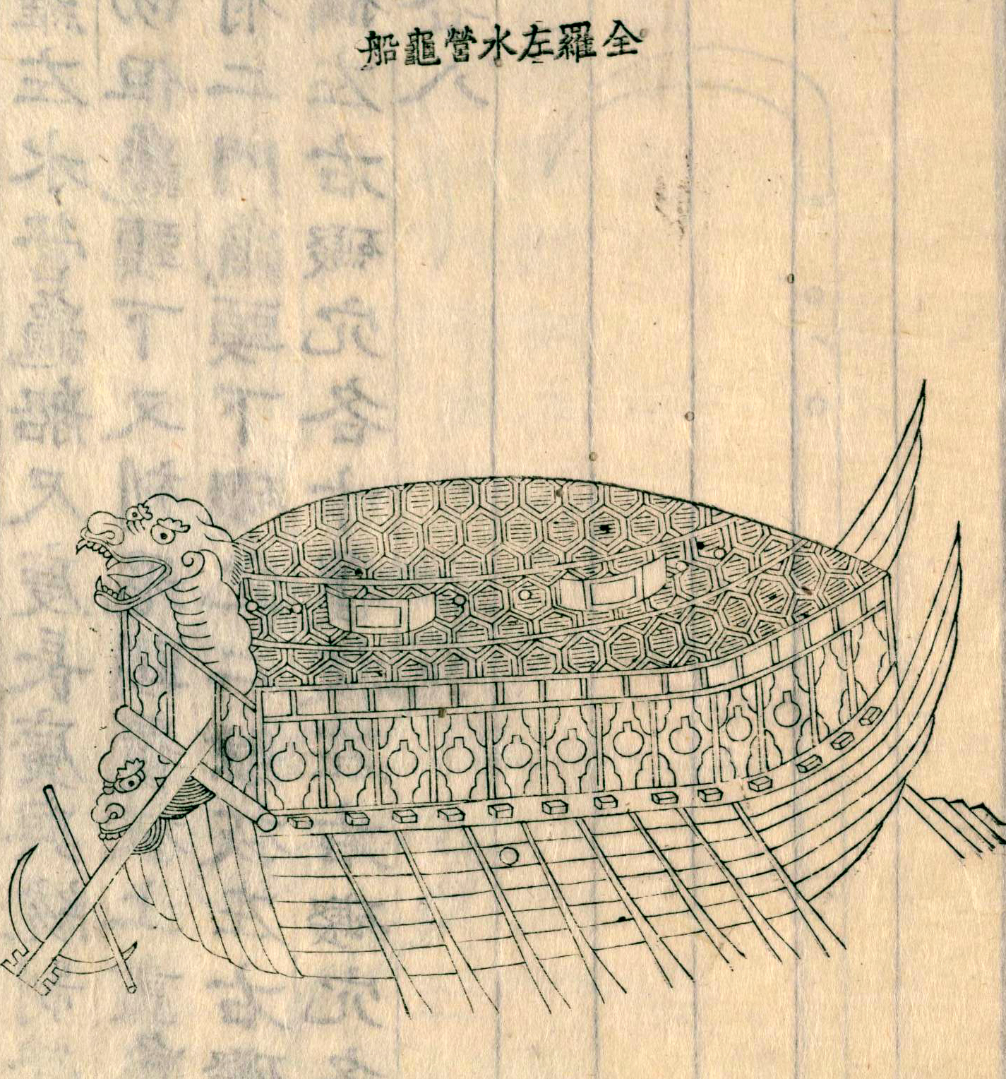 全羅左水営亀船/李忠武公全書（1795年）